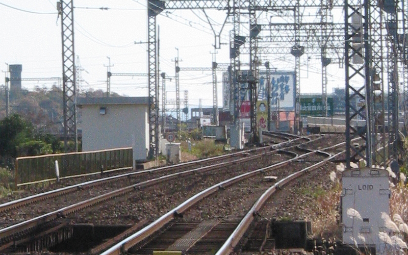 近畿日本鉄道大阪線の宮古分岐。大阪側より撮影、右奥が伊勢中川駅で左方向の単線分岐線が中川短絡線。2006/12/03 投稿者が撮影・レタッチ